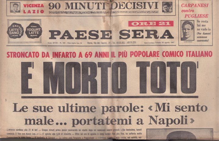 Notizia della morte di Totò